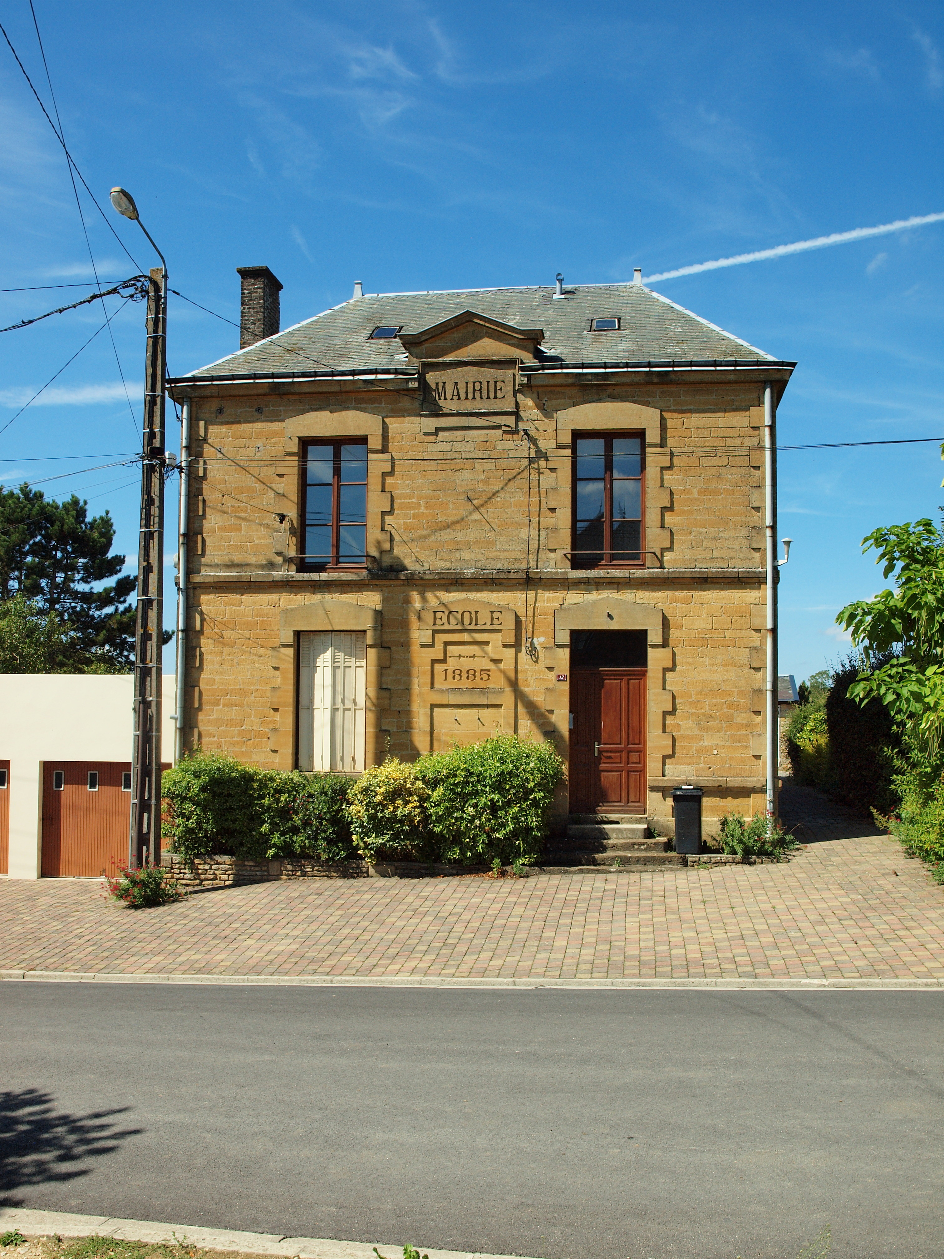 Bar-lès-Buzancy (Ardennes, France)